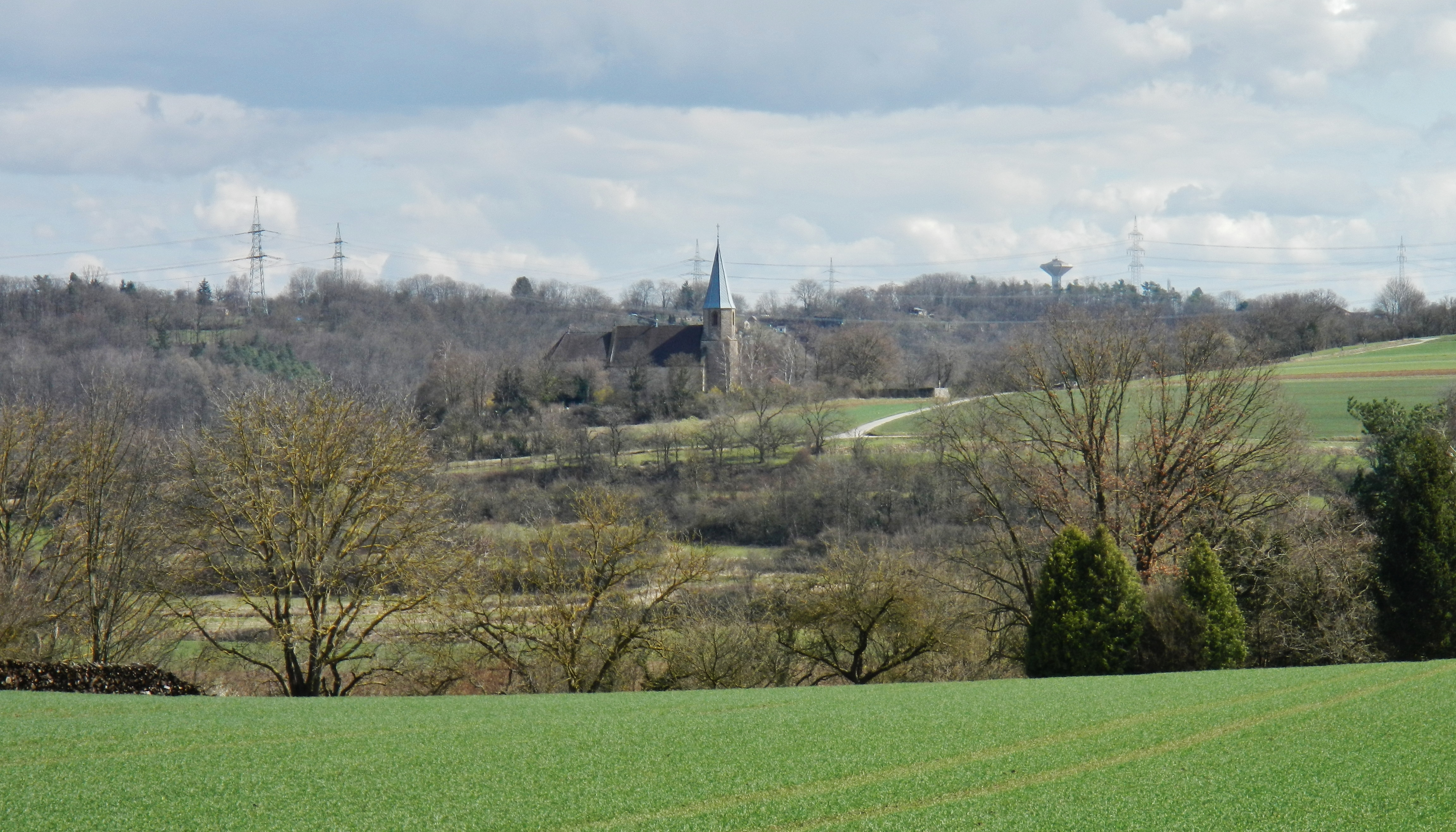 Blick von unterhalb des Oberriexinger Reutwalds zur Unterriexinger Frauenkirche und zum Markgröninger Wasserturm.